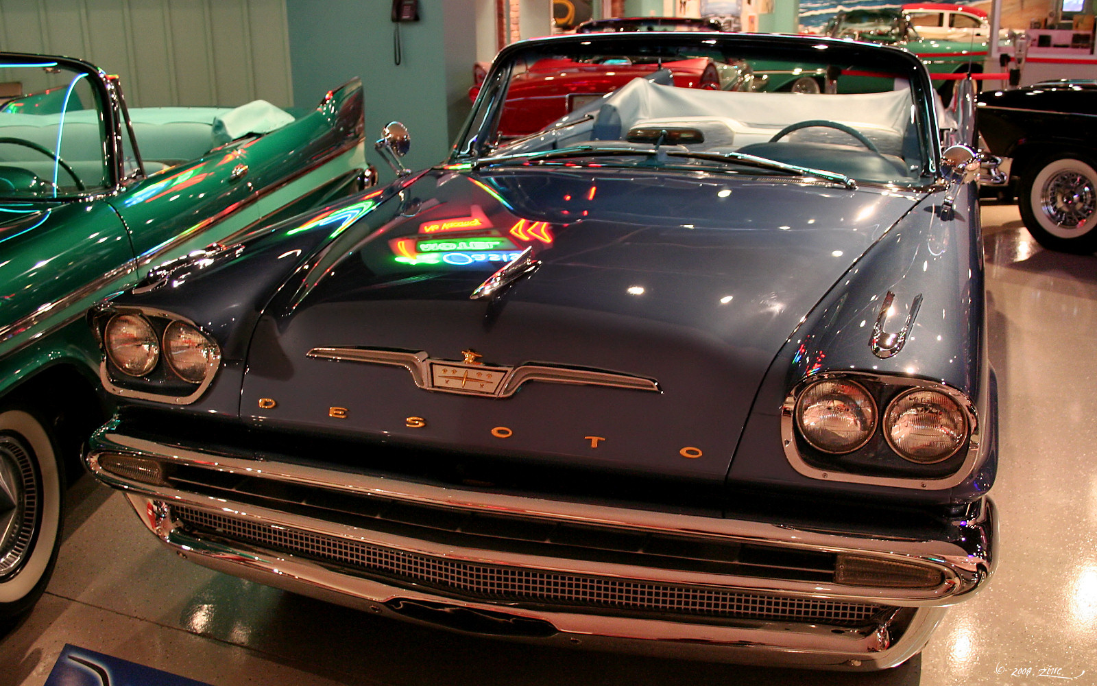 '57 Heaven Museum & Branson/Springfield, MO, March 20, 2008